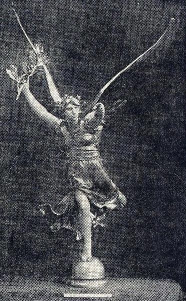 La coupe du journal 'l'Auto', remise au vainqueur du Grand Prix de l'ACF 1912.